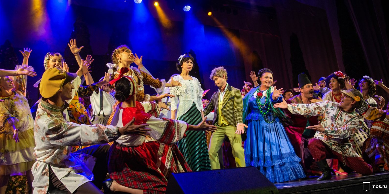 Надежда Бабкина и Дмитрий Хрусталев в спектакле «За двумя зайцами» в театре «Русская песня»